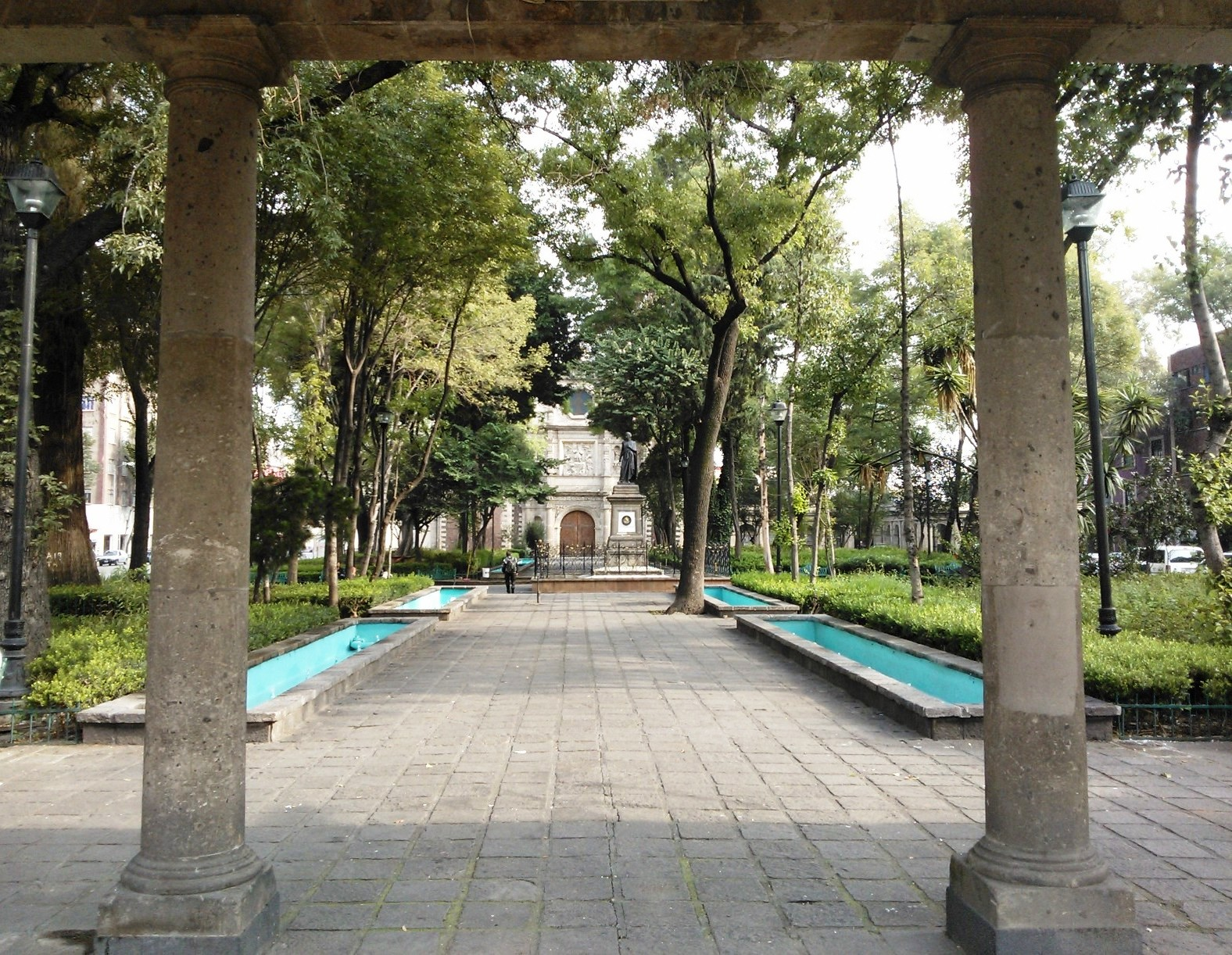 Plaza de San Fernando en la colonia Guerrero Mexico D.F.